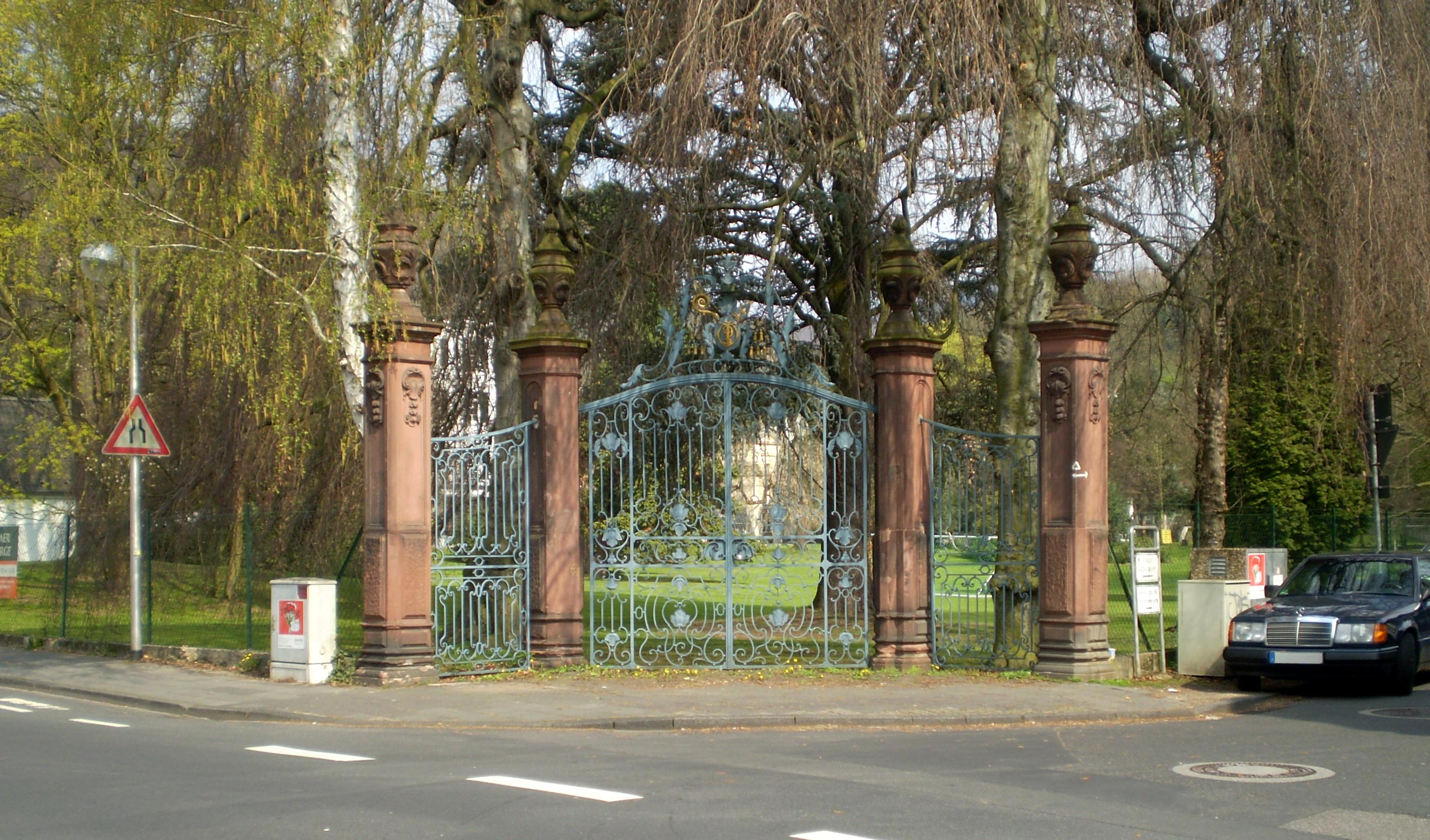 Tor zum Park der Villa Merkens (Haus im Turm) an der Ecke Rhöndorfer Straße/Frankenweg in Rhöndorf, Bad Honnef